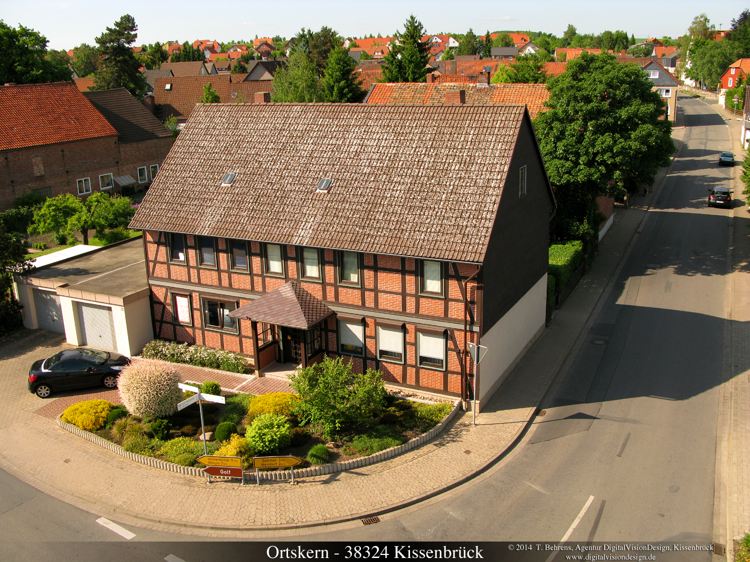 Hochstativfotografie vom Zentrum der Ortschaft 38324 Kissenbrück (Landkreis Wolfenbüttel, Niedersachsen). Foto: Dipl.-Designer (FH) Thorsten Behrens, Agentur DigitalVisionDesign